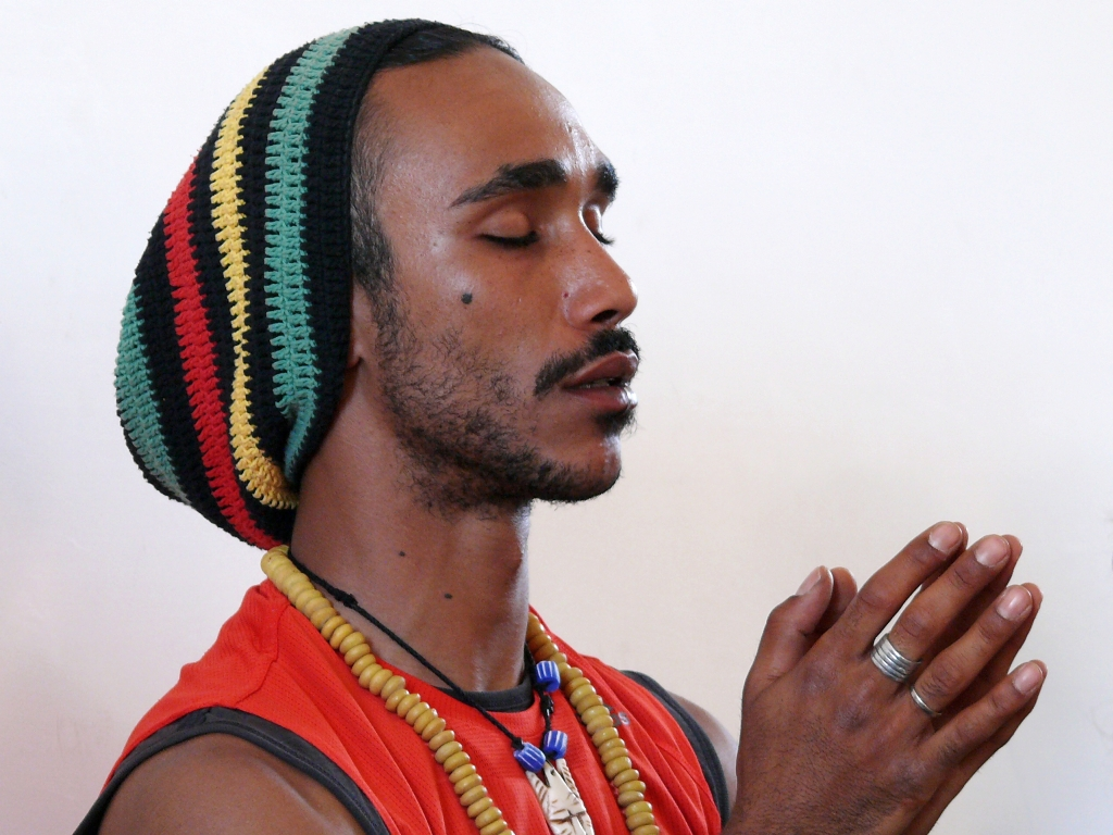 Meditação profunda